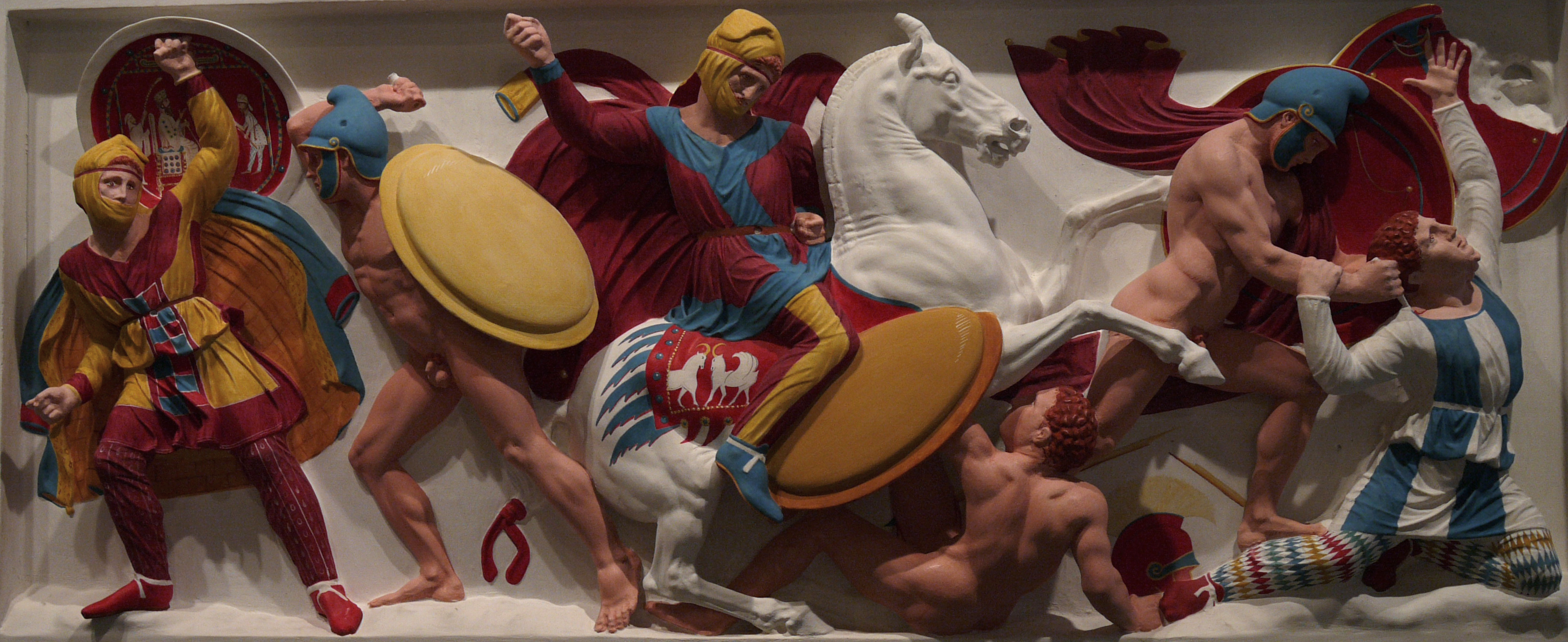 Reconstrucción parcial policromada del "Sarcófago de Alejandro", sarcófago que procede de la capital real de Sidón (Líbano), obra de un taller griego en funcionamiento en torno al 320 a. e. Esta imagen corresponde al lado menor de dicho sarcófago: lucha entre griegos y persas (aunque no se aprecie en la toma, el persa de la izquierda que levanta el escudo tenía los ojos azules -"azul aguamarina"-) Exposición "El color de los dioses", Alcalá de Henares 2010.